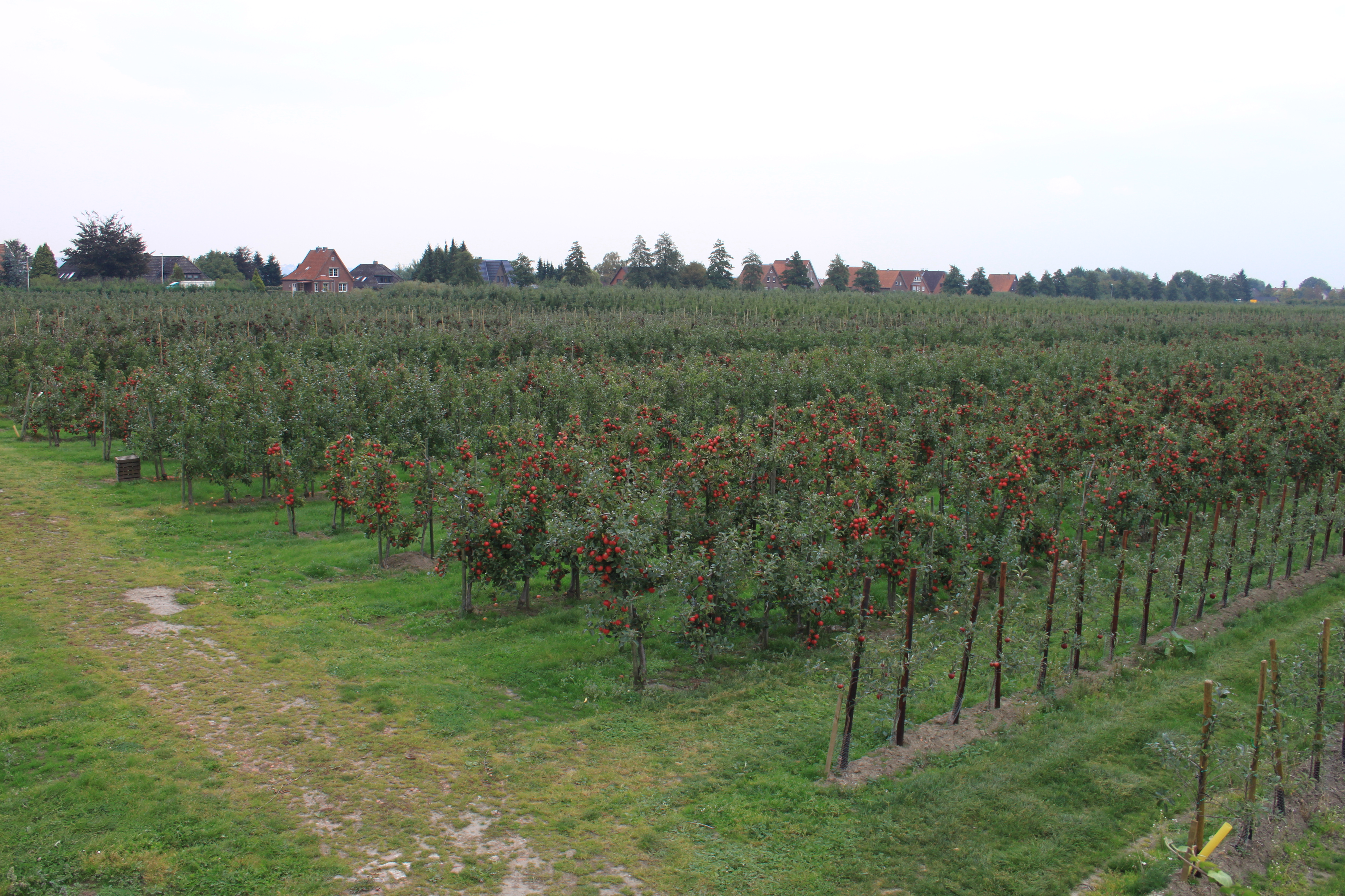 Apfelernte 2014